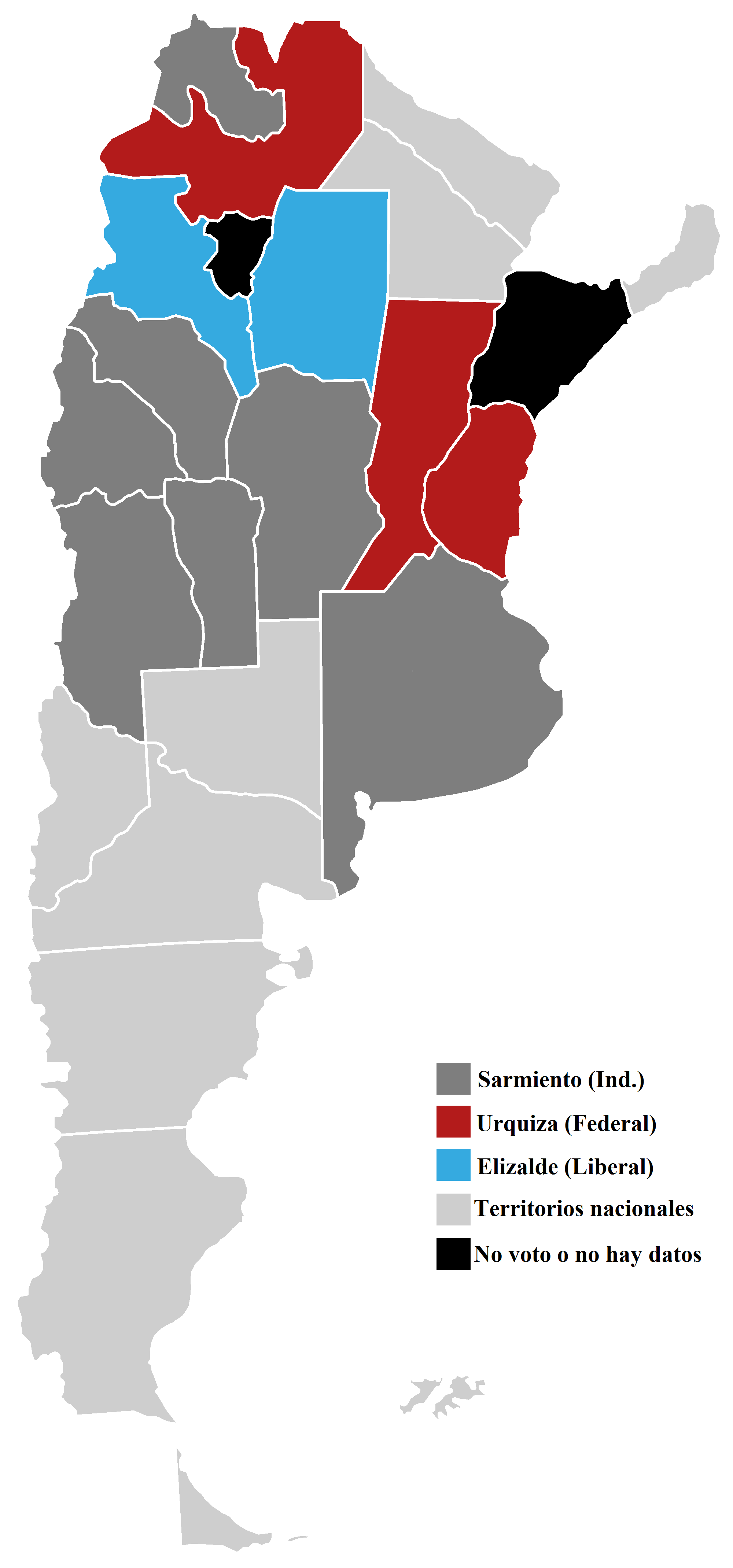 Mapa del resultado electoral de las elecciones presidenciales argentinas de 1868 por provincia.